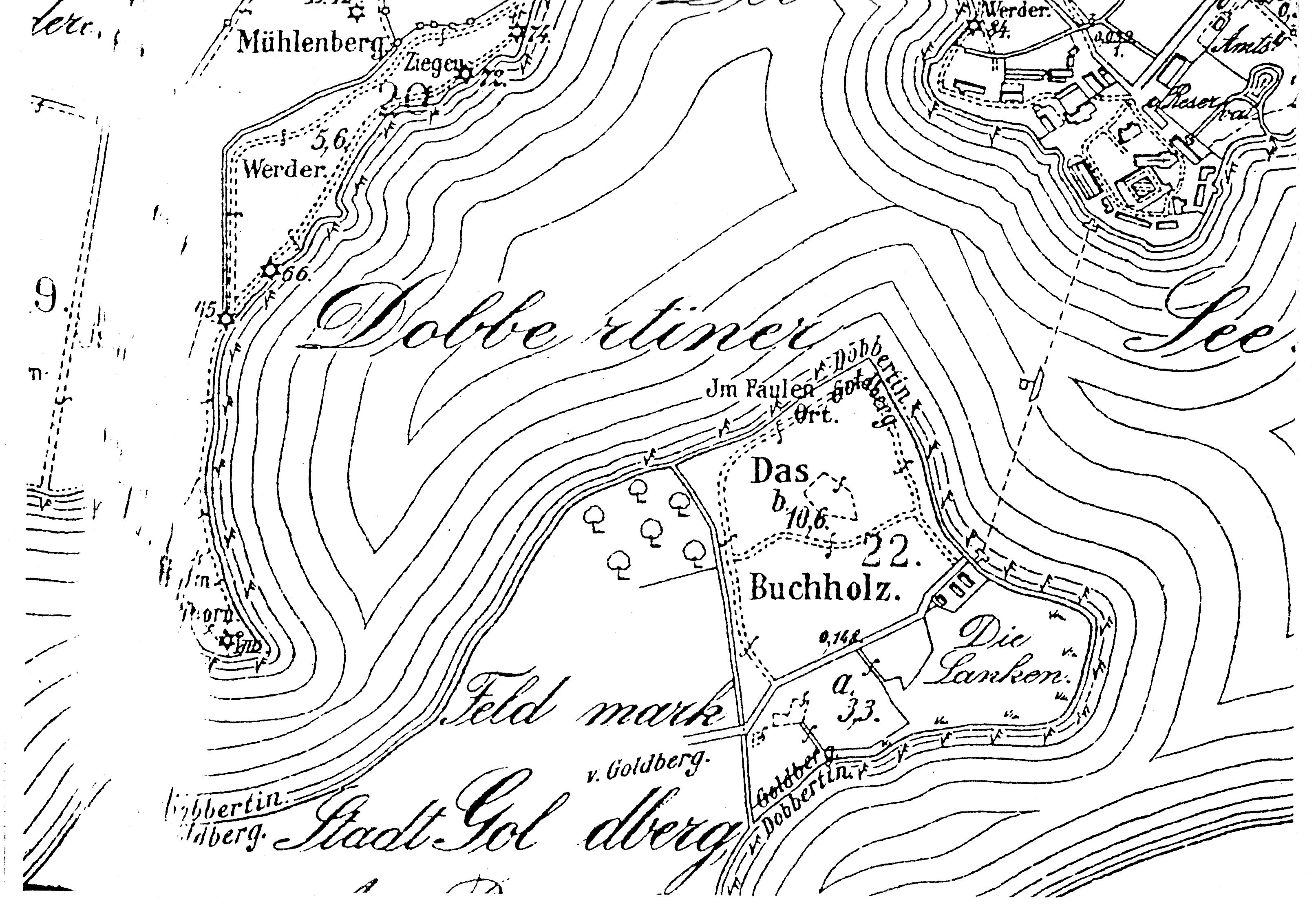 Lage der Halbinsel Buchholz im Dobbertiner See. Auszug aus der Wirtschaftskarte Forstamt Dobbertin 1927/1928